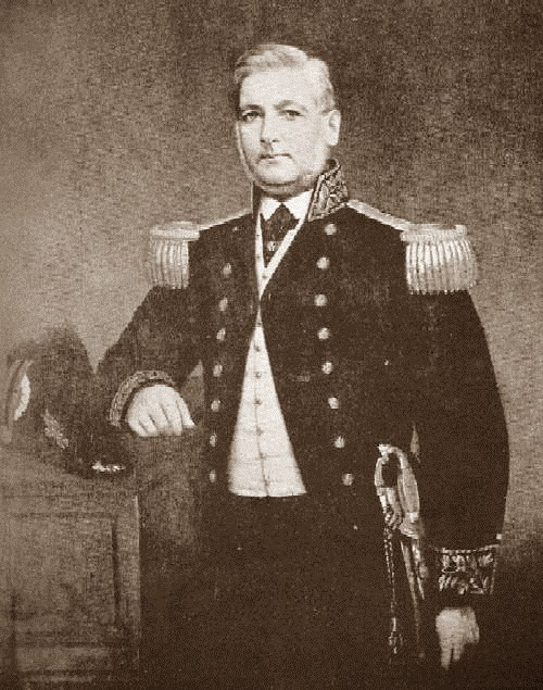 Jose Coelho de Meyrelles retrato por Prilidiano Pueyrredon